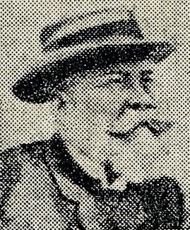 Gustave Gobron en 1908 (membre de la Commission sportive de l'ACF la même année).